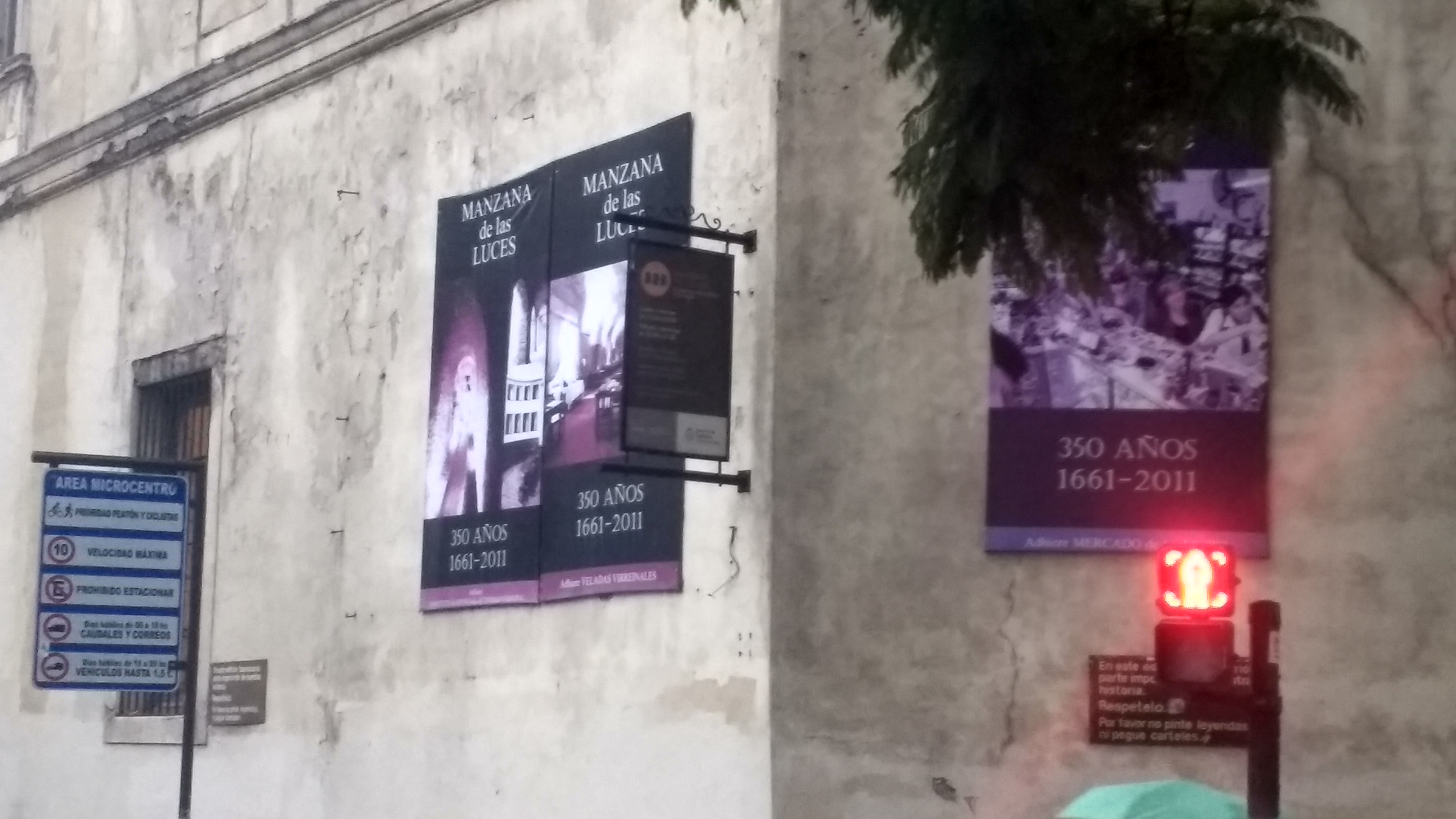 Esta es una esquina de la Manzana de las Luces en Argentina,Buenos Aires ;)Manzana de las Luces